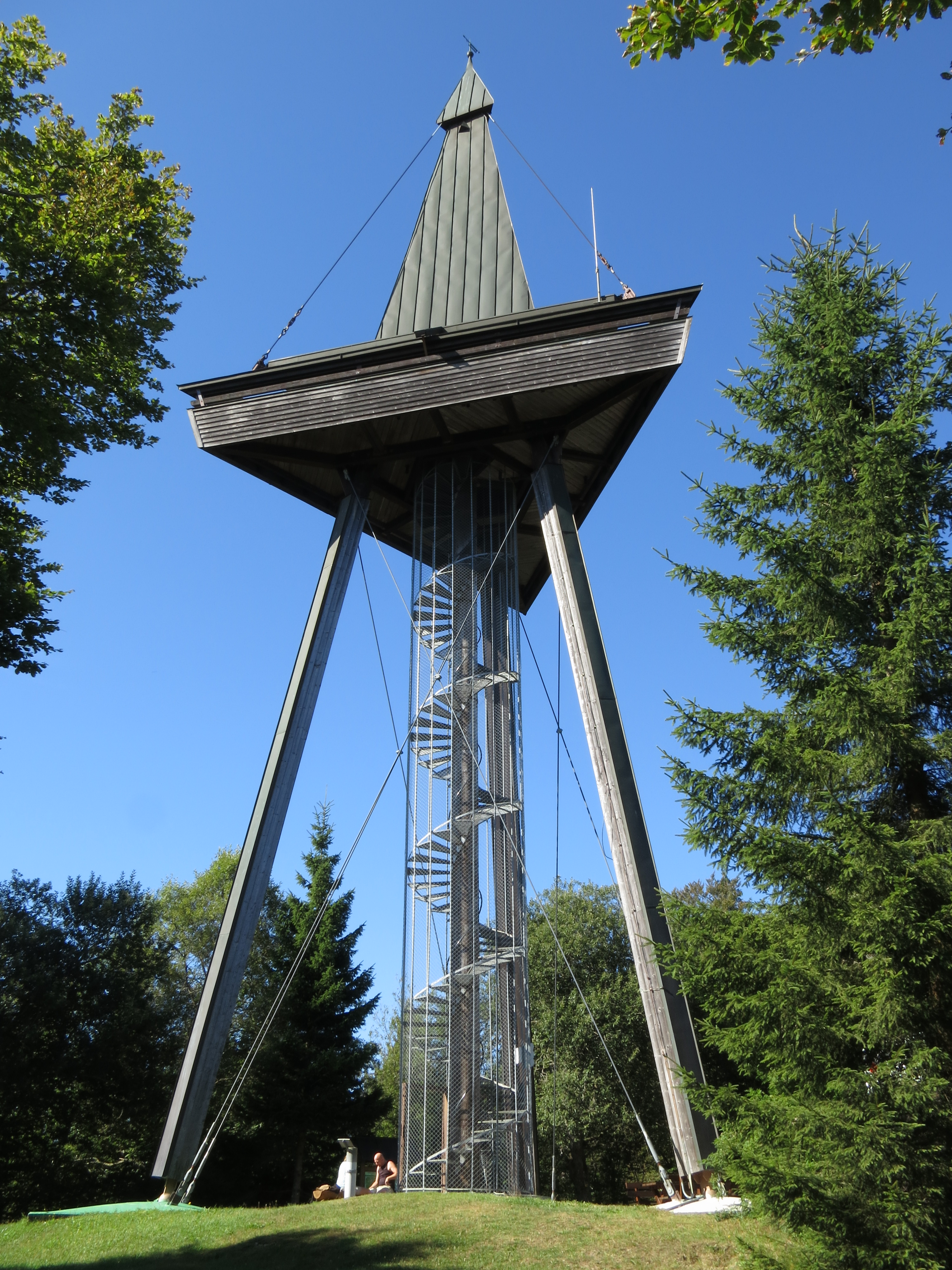 Aussichtsturm auf dem Gugel bei Herrischried im Hotzenwald.